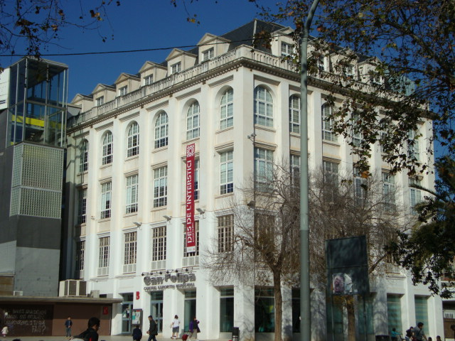 Edifici Can Felipa. Antiga fàbrica de l'empresa Catex.